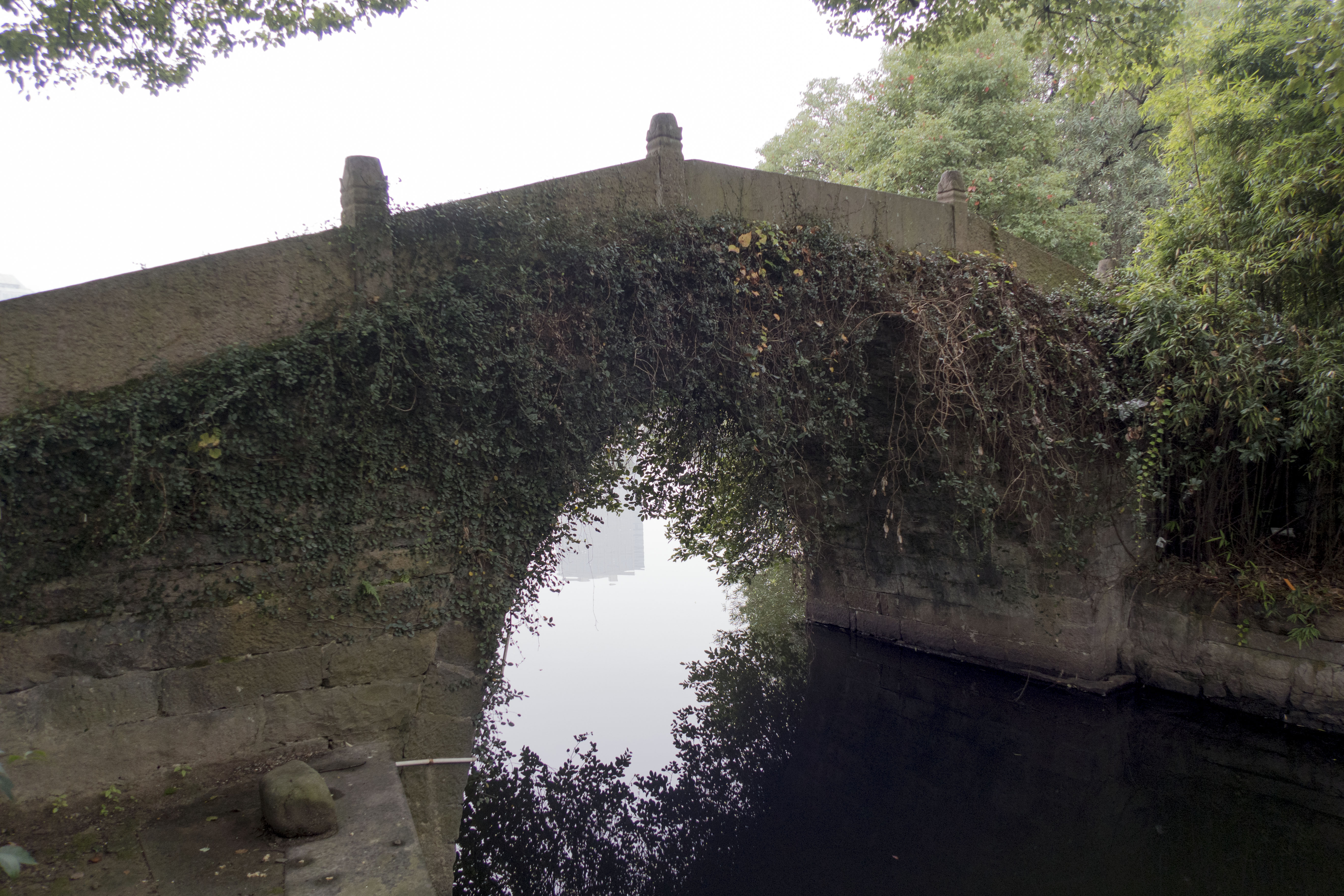 宁波月湖桥